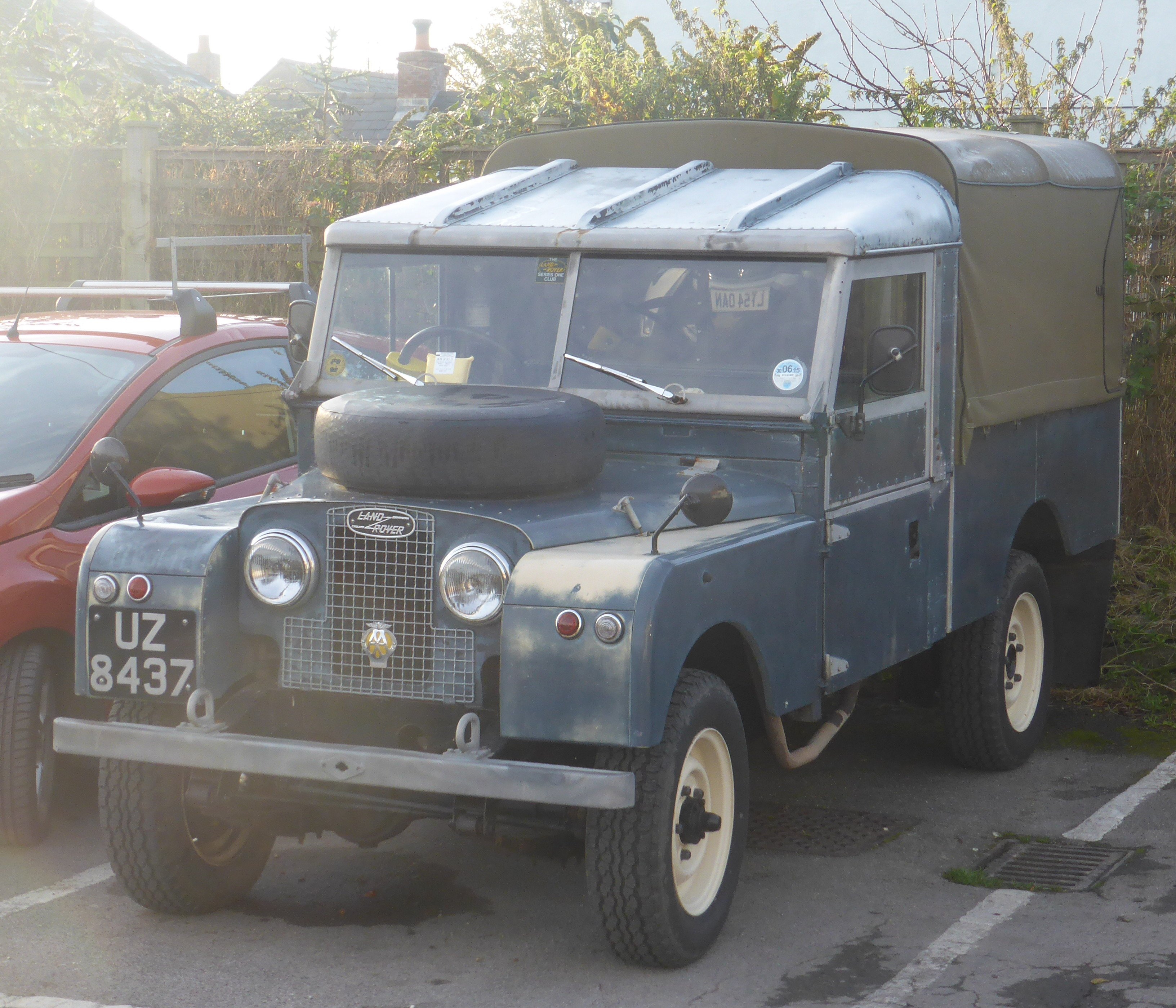 Land-Rover Series I (1957)